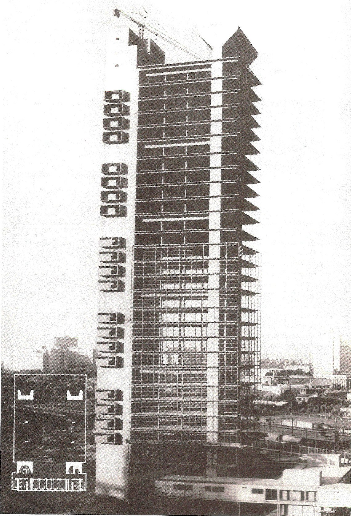 Estructura en construcción de la torre de la Unión Industrial Argentina en el conjunto Catalinas Nortes. Obra del estudio de los arquitectos Manteola, Petchersky, Sanchez Gómez, Santos, Solsona y Viñoly. Buenos Aires, Argentina.